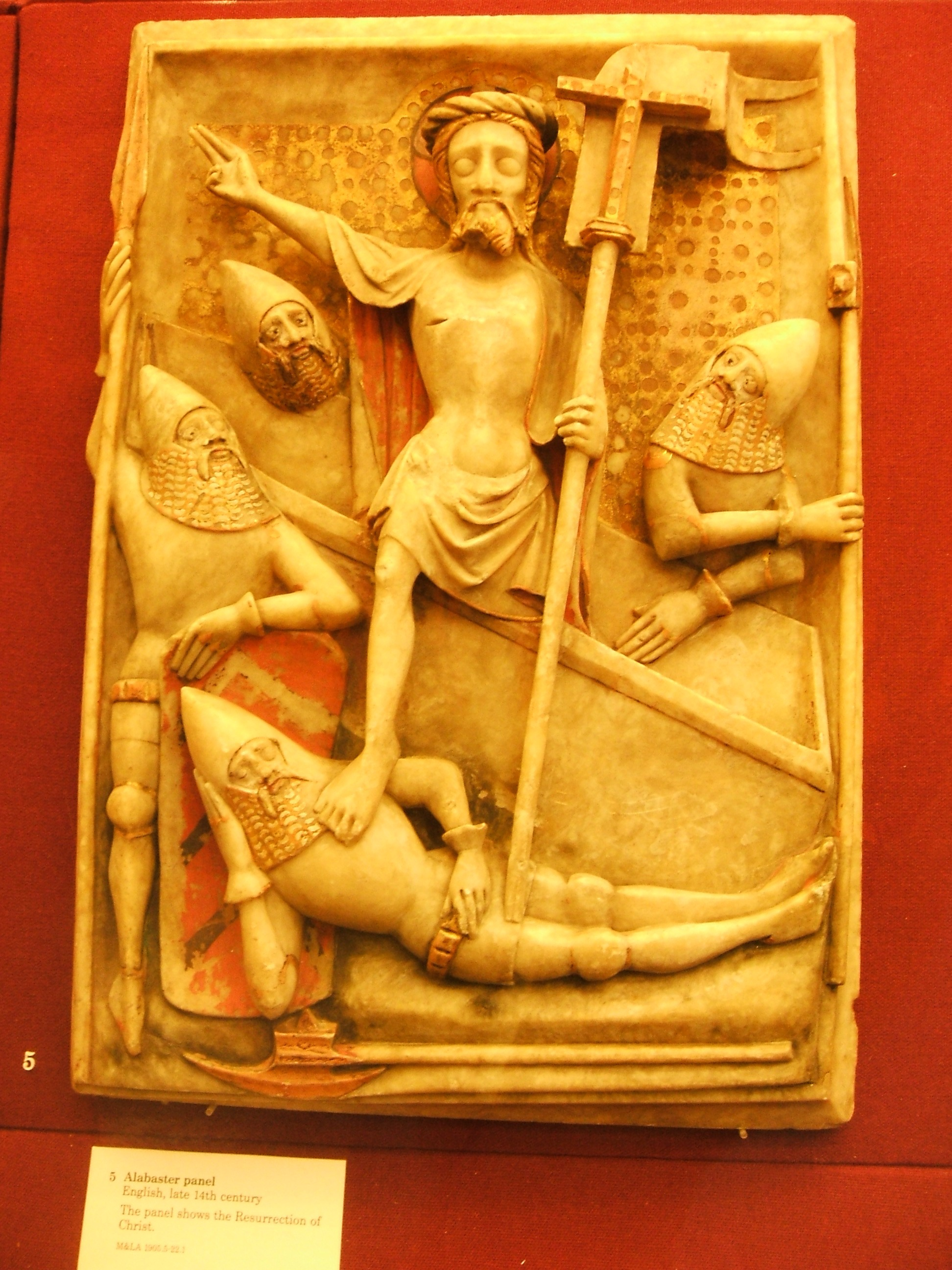 En el British Museum de Londres (Reino Unido) se conserva esta placa de alabastro, del s. XIV, con un altorrelieve que representa la Resurreción de Cristo. Una pieza similar se encuentra en el Museo Arqueológico de Jerez de la Frontera.(Cádiz, España).